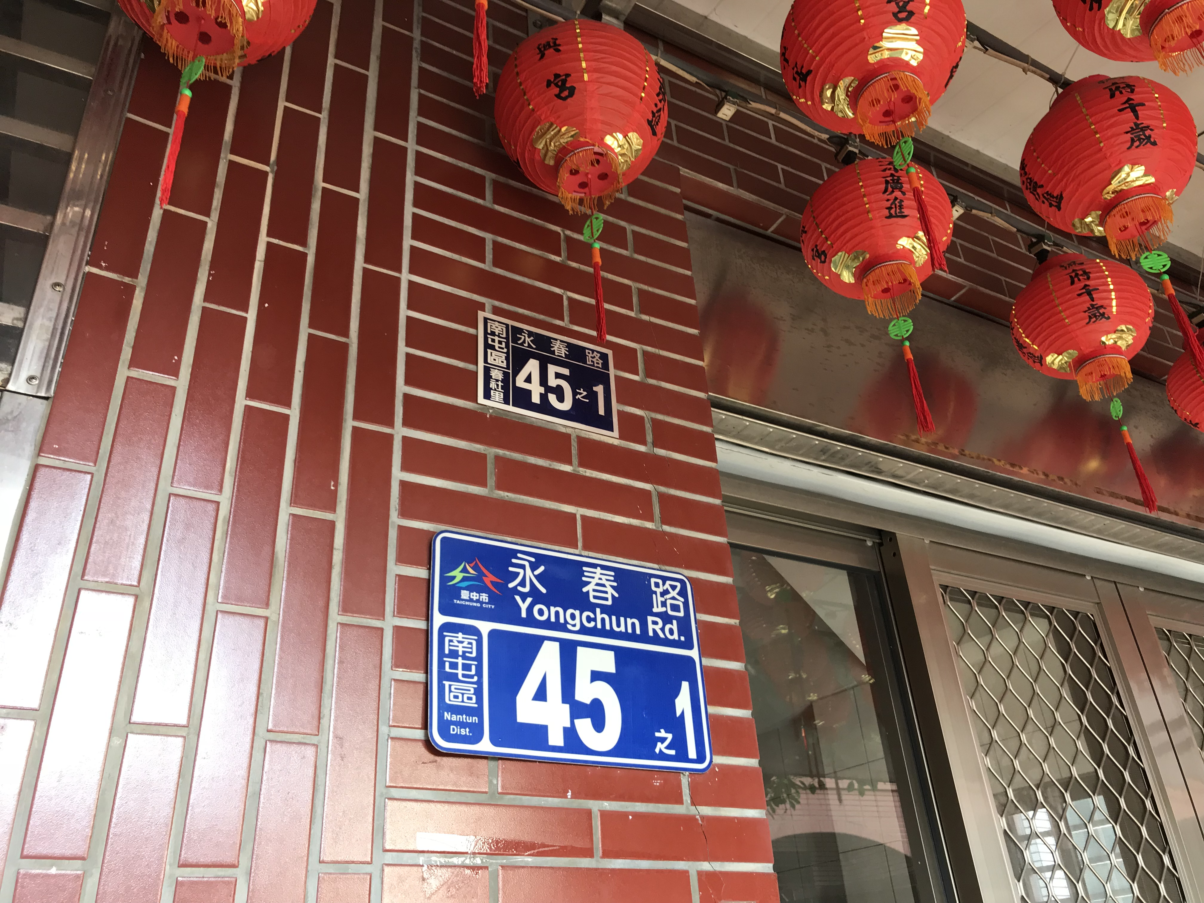 中文（台灣）: 南屯復興宮門牌